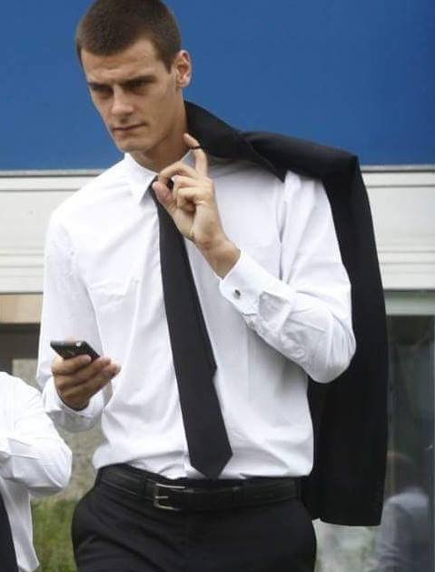 Alesksandar Vukotić u klupskom odelu